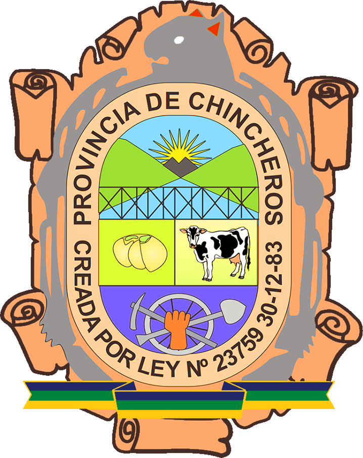 Escudo de la provincia de Chincheros - Apurímac